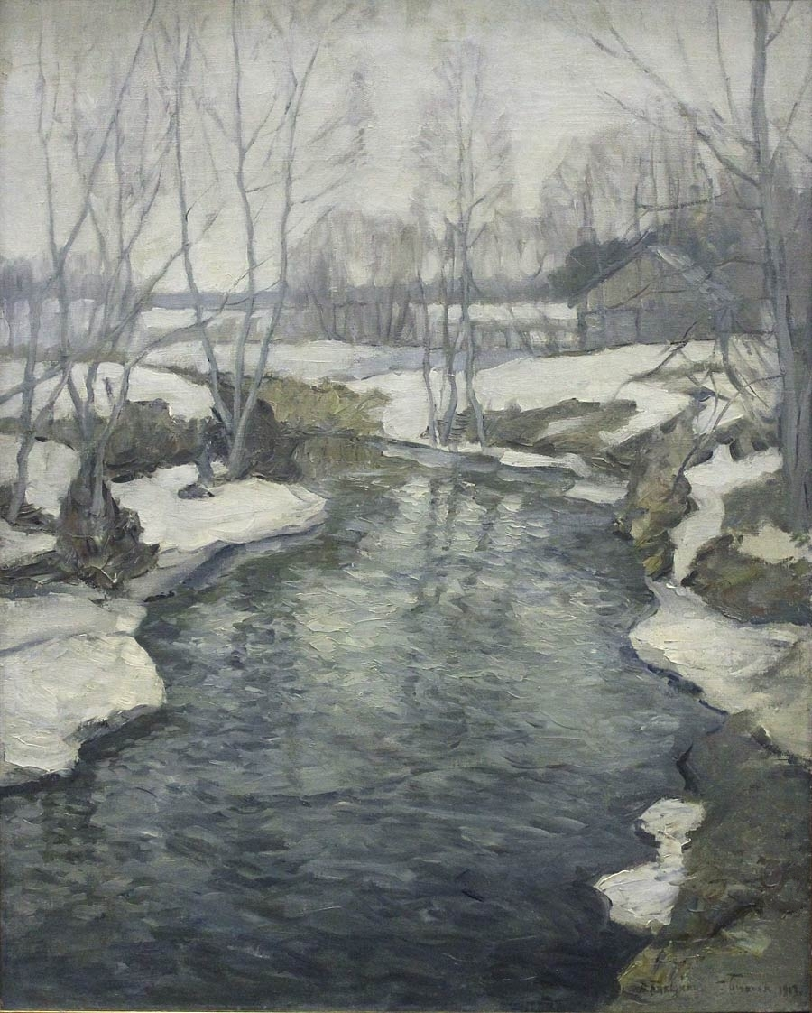 Весна идет Год создания 1913 Материал Холст, масло Собрание Национальный художественный музей Республики Беларусь